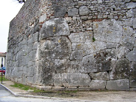 R.Passagrilli - Amelia Mura Poligonali porzione lato SE